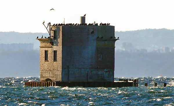 Wieża obserwacyjna na Zatoce Gdańskiej, na wysokości Jastarni (widok od strony Mierzei Helskiej). Pozostałość po niemieckim poligonie doświadczalnym torped z czasów II wojny światowej. Autor zdjęcia: Andrzej Jóźwik, Ośrodek Wczasowy "Augustyna" w Jastarni. Licencja: GNU FDL.